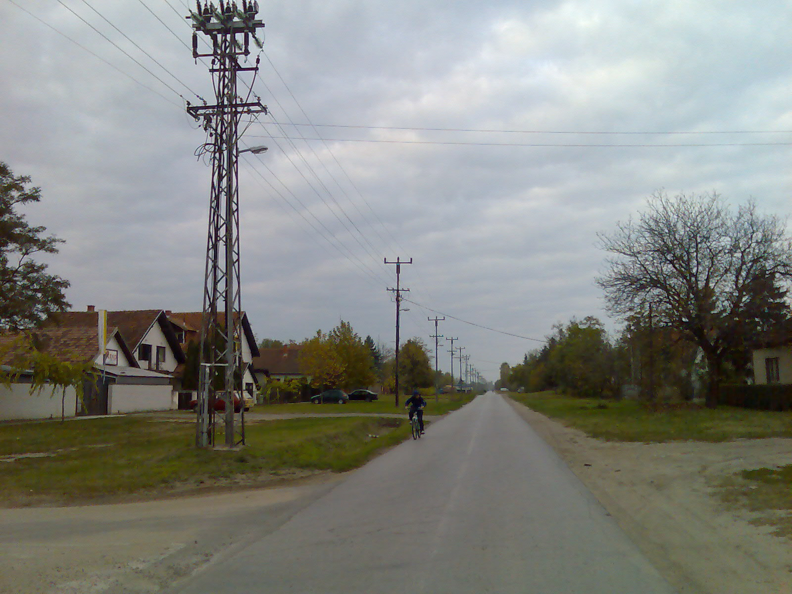 Radanovac Pescarina ulica.jpg Autor: Josip FLEIS, Izvor: Sopstvena fotografija